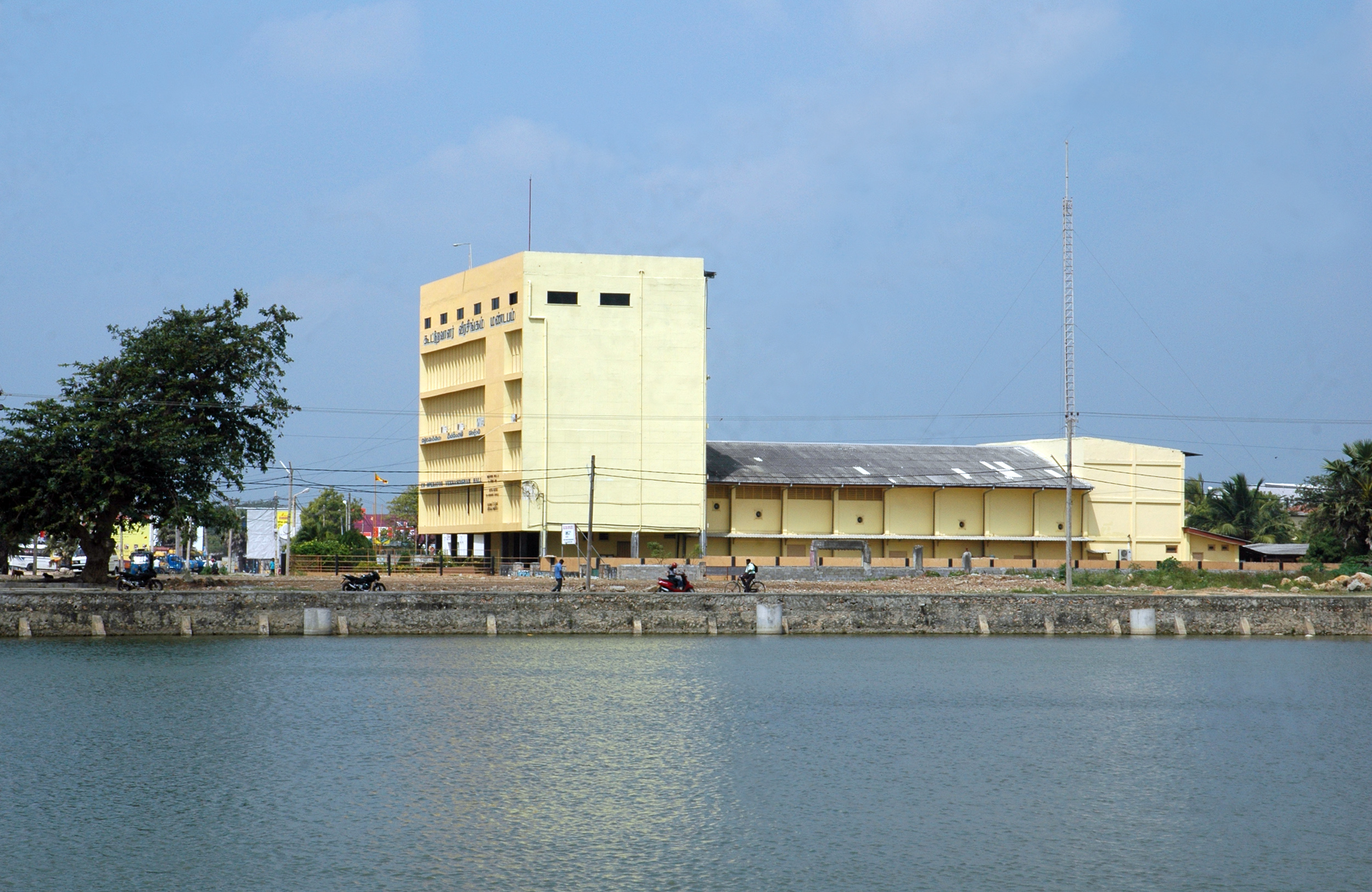 கூட்டுறவாளர் வீரசிங்கம் மண்டபம், யாழ்ப்பாணம்